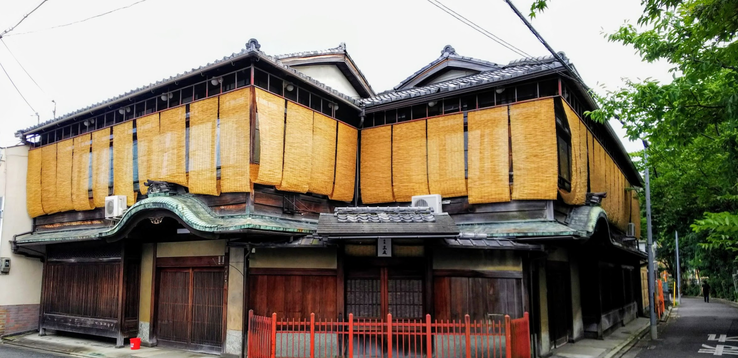 五条楽園 本家三友